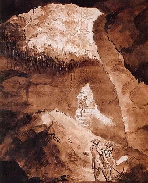 Zeichnung der im Harz gelegenen Einhornhöhle durch den kurhannoverschen Hofmalers Johann Heinrich Ramberg ...